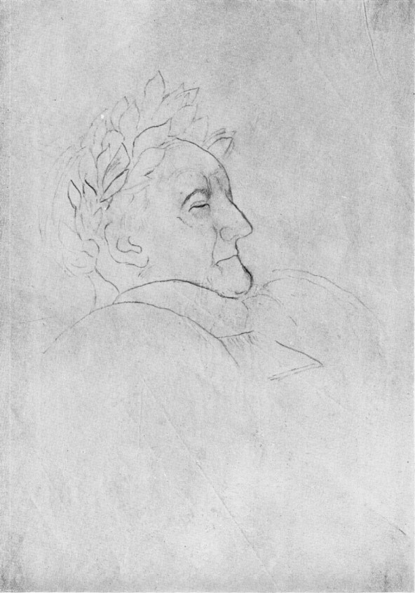 Goethe im Tode - Erste Zeichnung von Friedrich Preller (Vater), am Tage nach Goethes Tod, dem 23. März 1832 entstanden